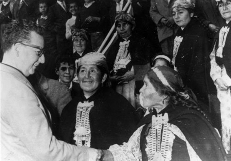 Salvador Allende saludando a mujeres mapuches.